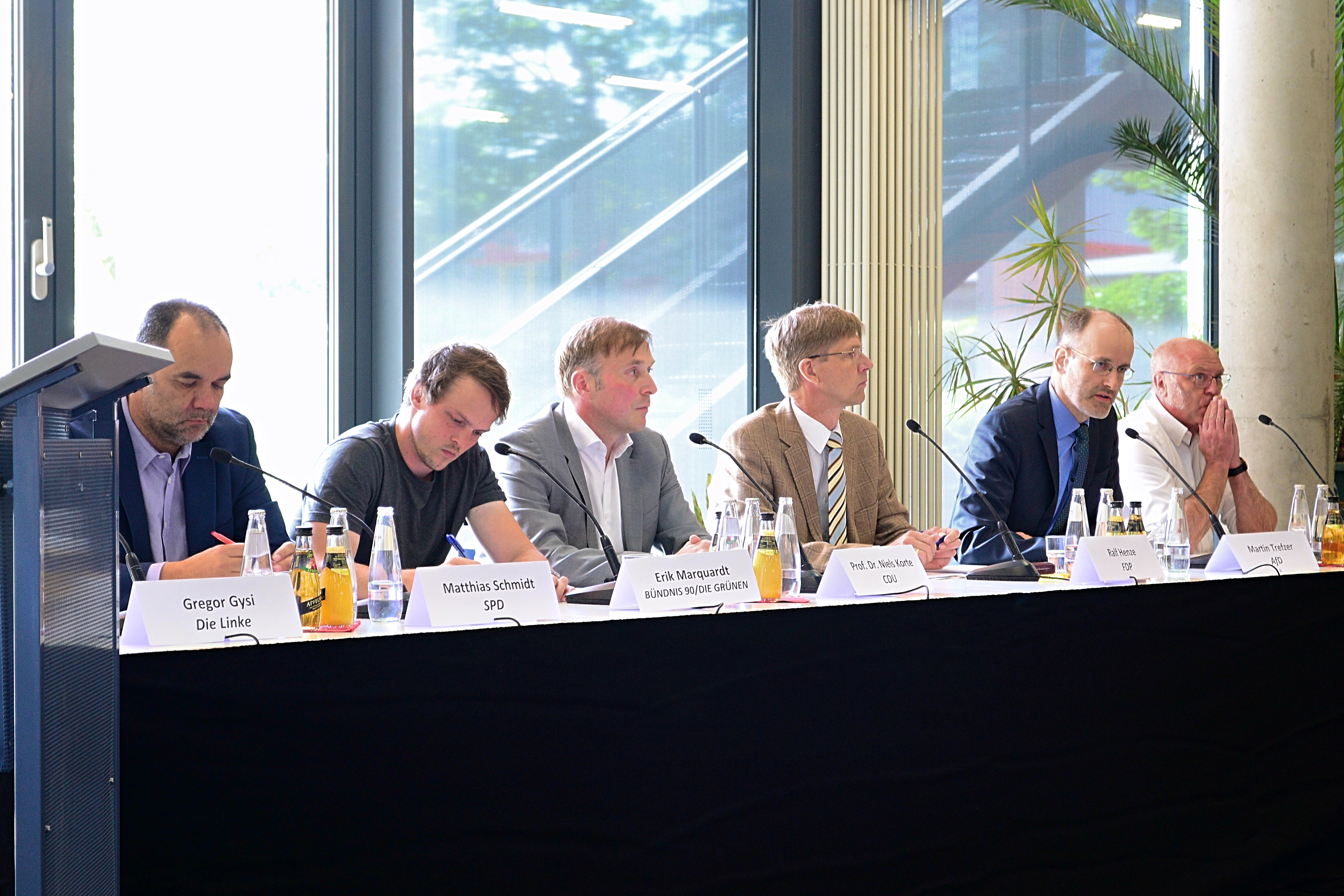 Podiumsdiskussion an der Hermann-Scheer-Schule mit Parteivertretern der CDU, SPD, Bündnis 90/GRÜNE, LINKE, FDP und AfD 2017